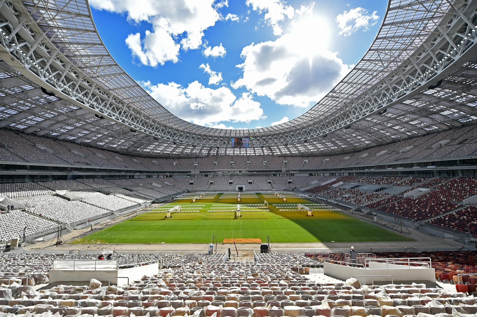 Реконструкция стадиона «Лужники» в Москве.